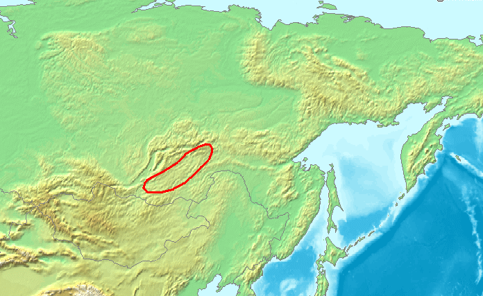 Location Yablonoi Mountains.PNG